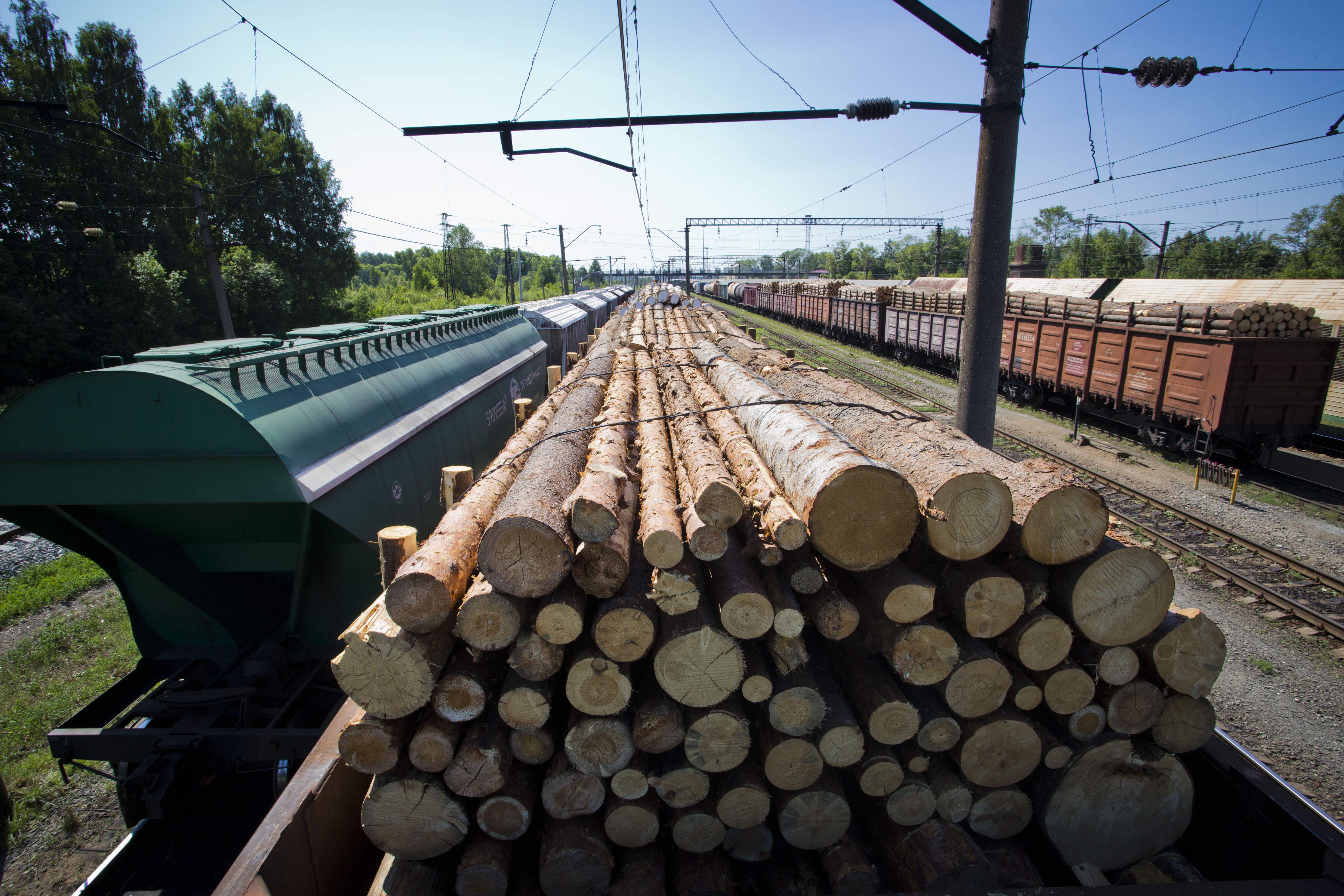 вагон с древесиной на станции Лянгасово под Кировом